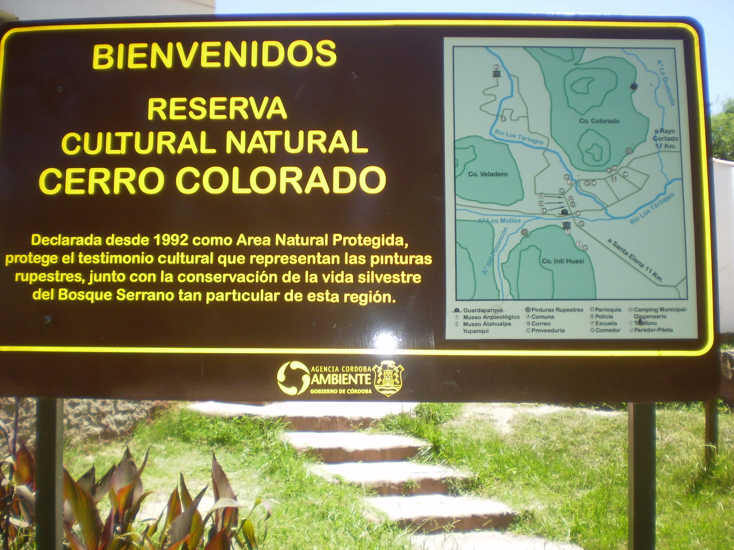 Cartel guía de la reserva natural de Cerro Colorado, Córdobas, Argentina